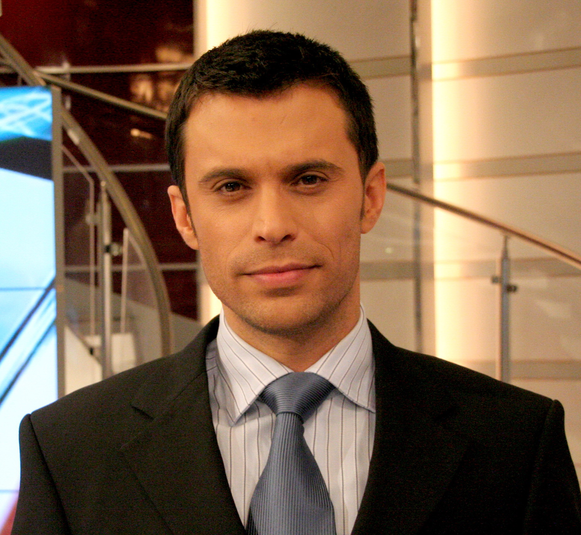 Oren Weigenfeld